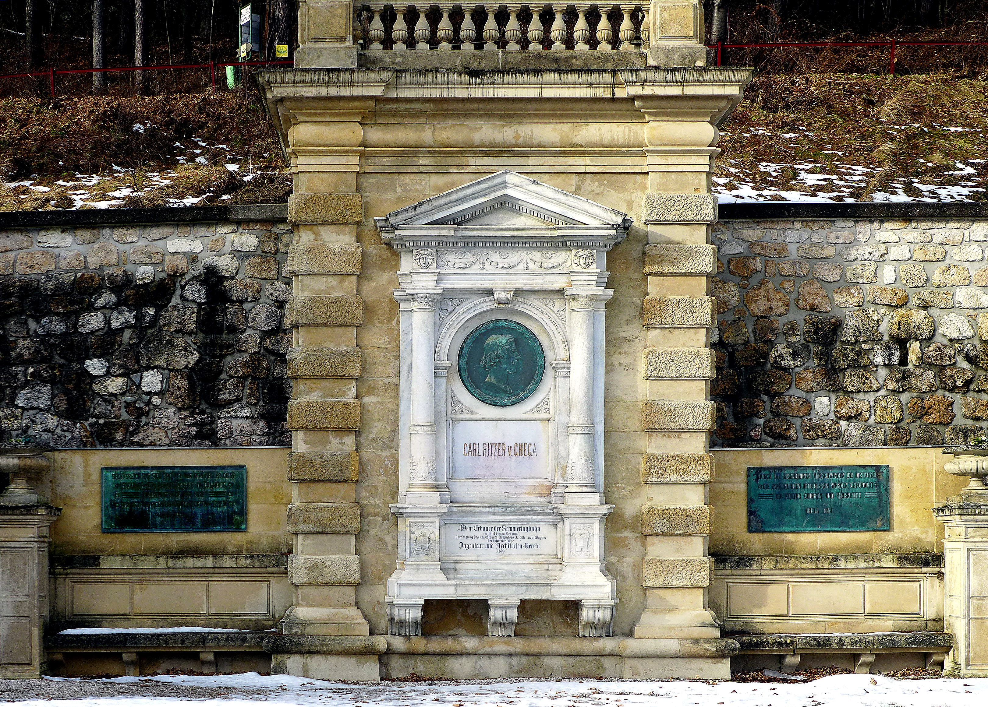 Karl Ritter von Ghega-emlékmű a semmeringi vasutállomáson levő világörökségi emlékhelyen (Ausztria)